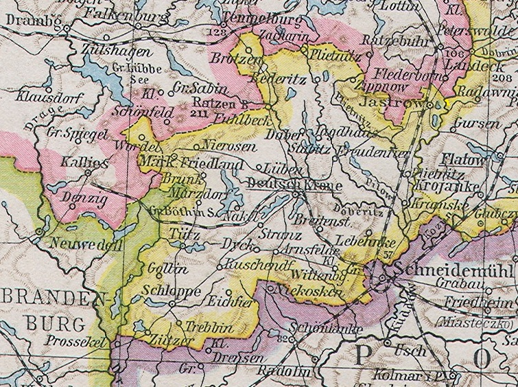 Karte:Kreis Deutsch Krone bis 1945, Ausschnitt aus